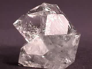 Mineral Kuarsa